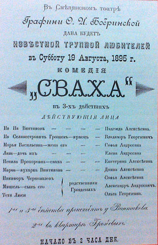 Театральна афіша "Комедия Сваха"